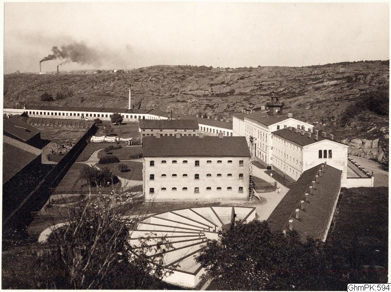 Centralfängelset, Nya Varvet, Göteborg. Närmast ses en av de båda rastgårdarna samt dagcellbyggnaden. Bakom denna ligger matinrättningen och däremellan ligger den östra rastgården, som är skymd. Till vänster det plank som skilde fängelset från hamnområdet.